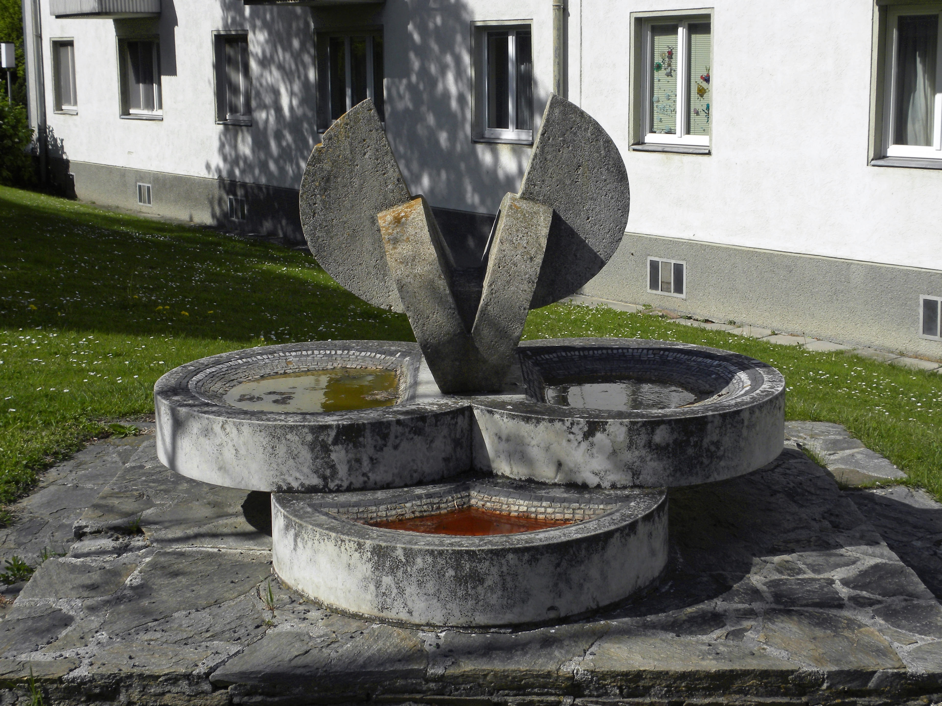 Der Brunnen in der Hanselmayergasse 9 - 15